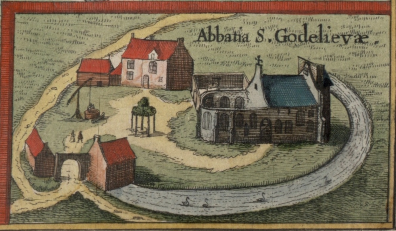 Sint-Godelieve abdij in de 1e helft van de 17e eeuw - Afbeelding uit Flandria Illustrata (1641)